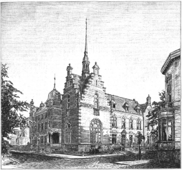 Bochum, Kreishaus, Ansicht von Westen